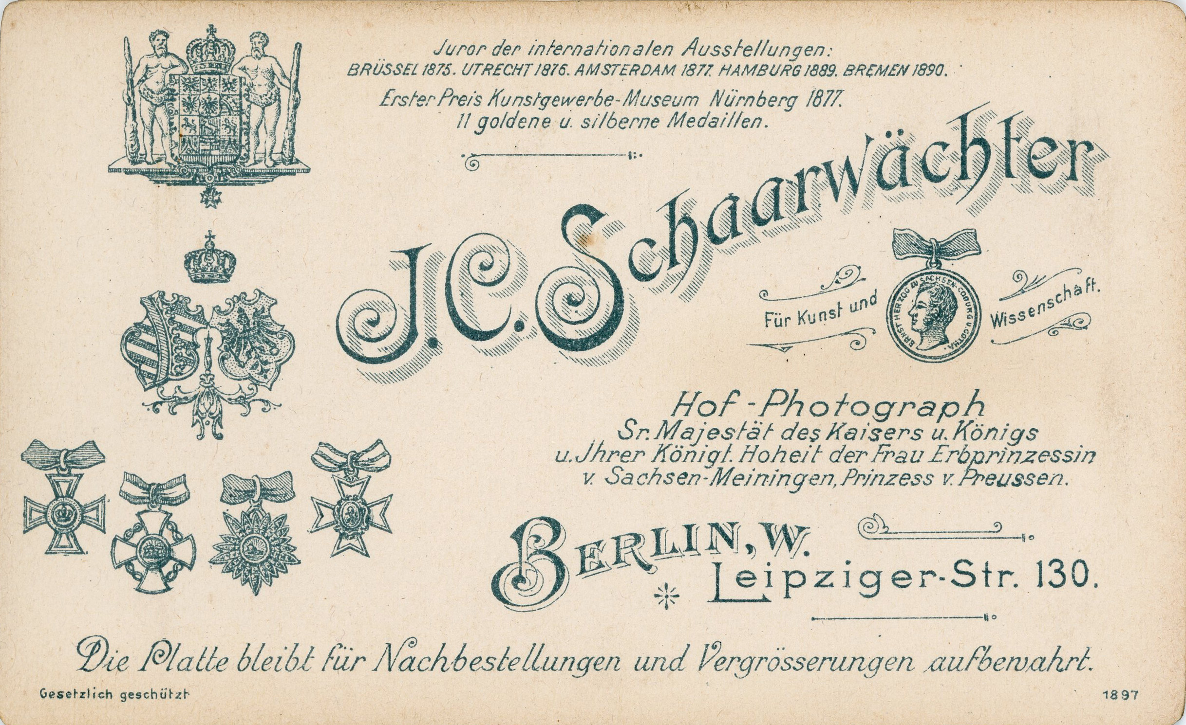 Rückseite einer Photographie von J. C. Schaarwächter